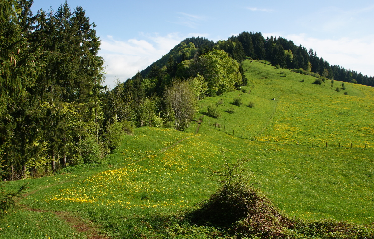 Am Rottachberg, Weg vom Pavillon zum Falkenstein.